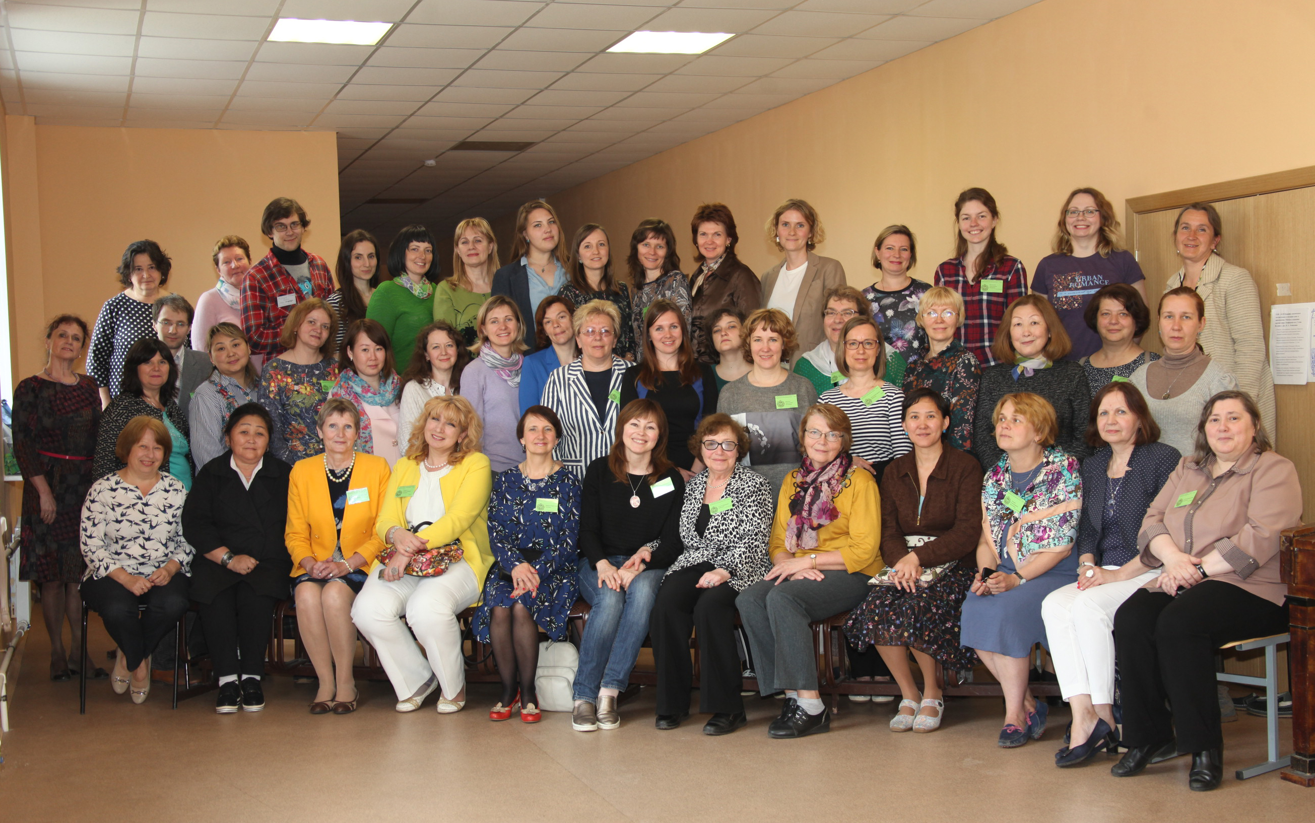 Международная научная конференция «Проблемы онтолингвистики — 2017: освоение и функционирование языка в ситуации многоязычия».